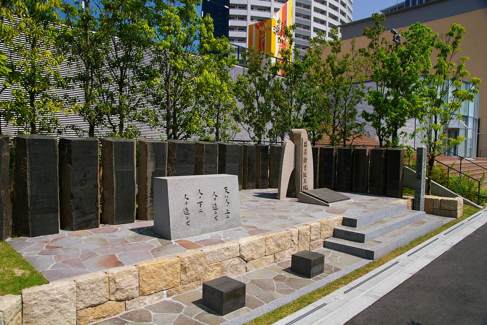 Monument of FUKUZAWA YUKICHI birthplace, at Hotarumachi, Fukushimaku, Osaka City, Japan.